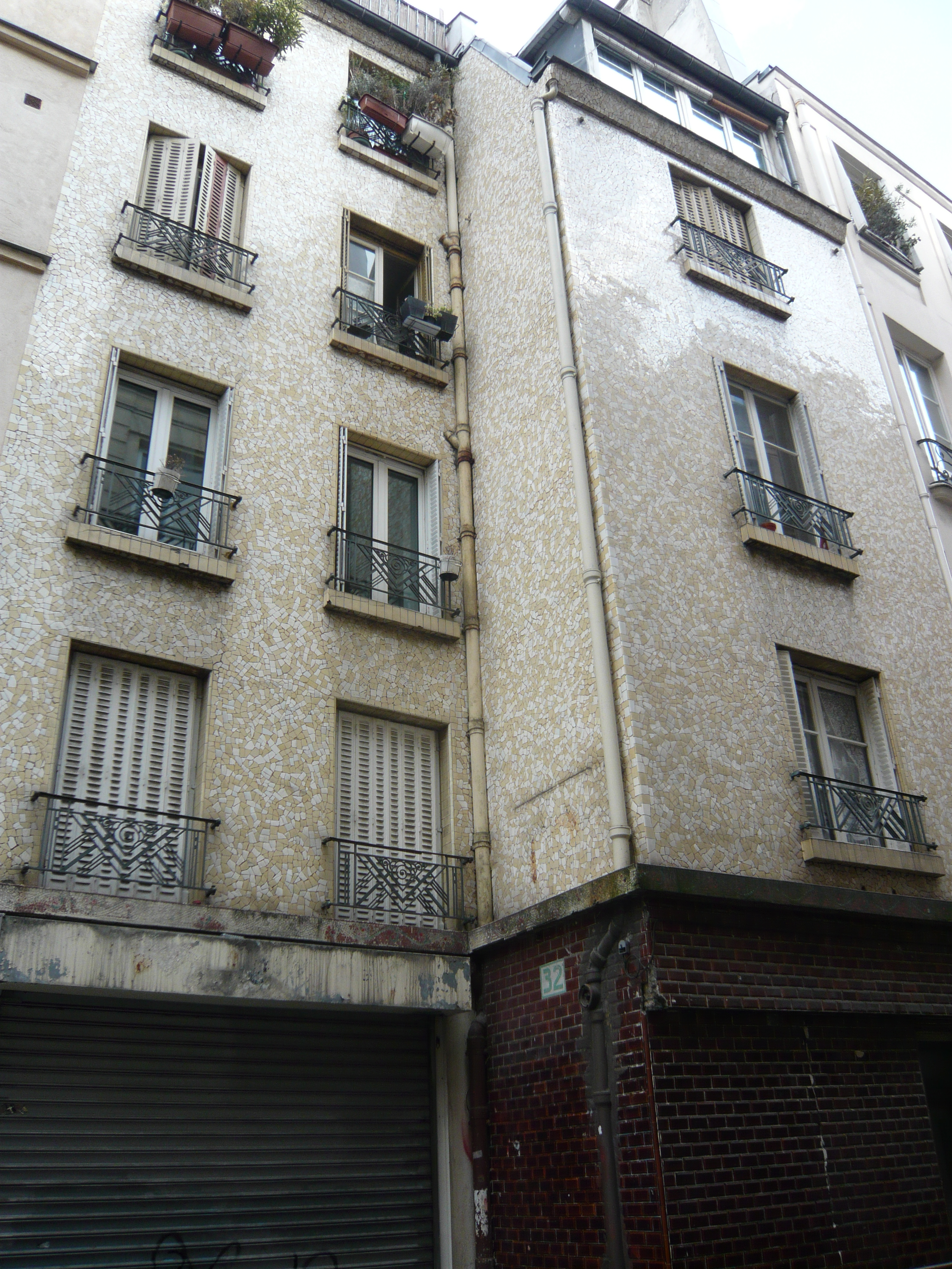 Ancienne maison close 32-34 rue Blondel 2e